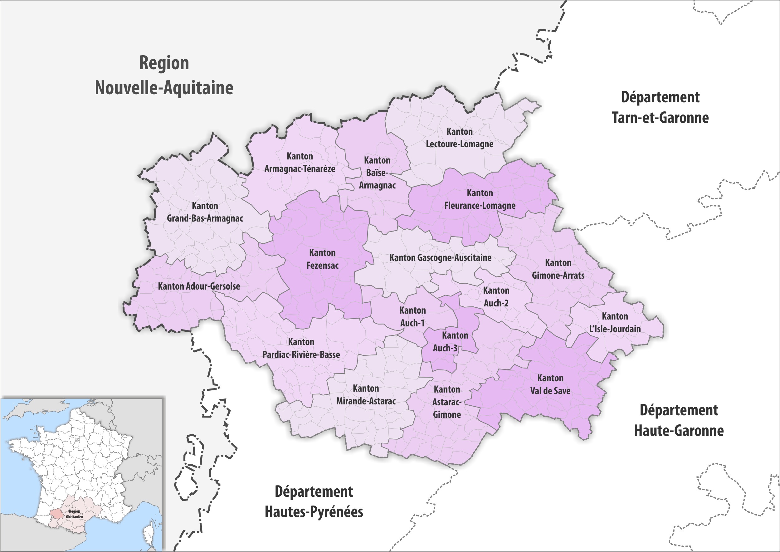 Gemeinden und Kantone im Departement Gers